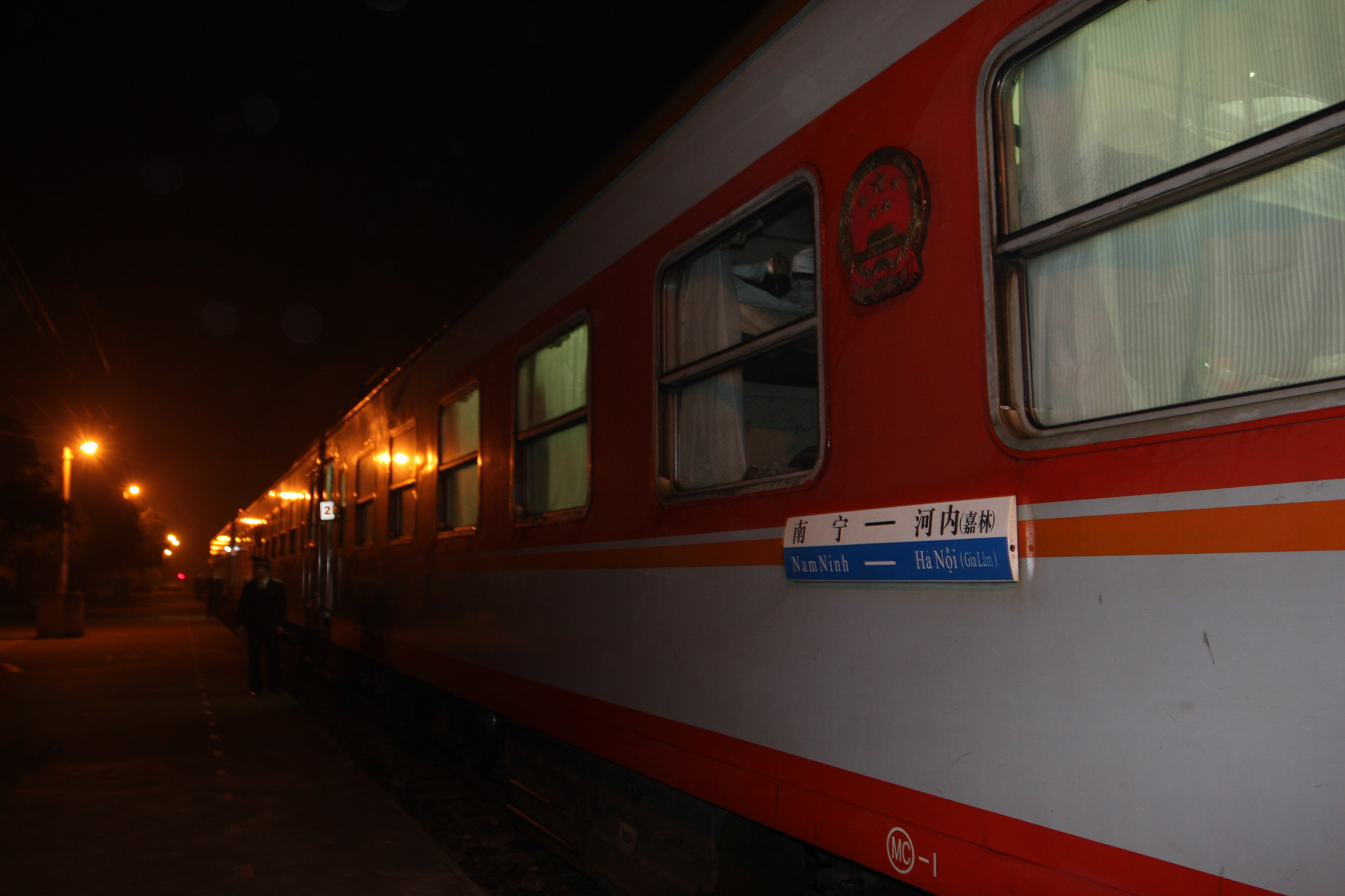 南宁-河内列车停靠于广西崇左站